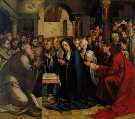 cena bíblica do "Pentecostes"